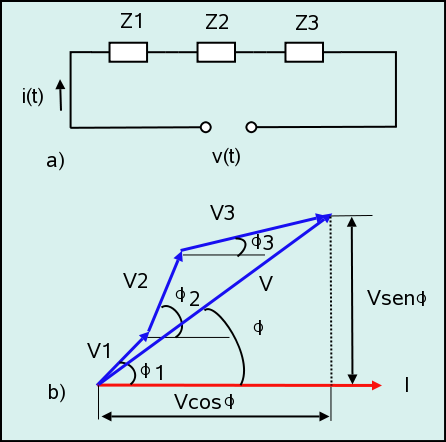 Circuito serie (Seraial circuit)